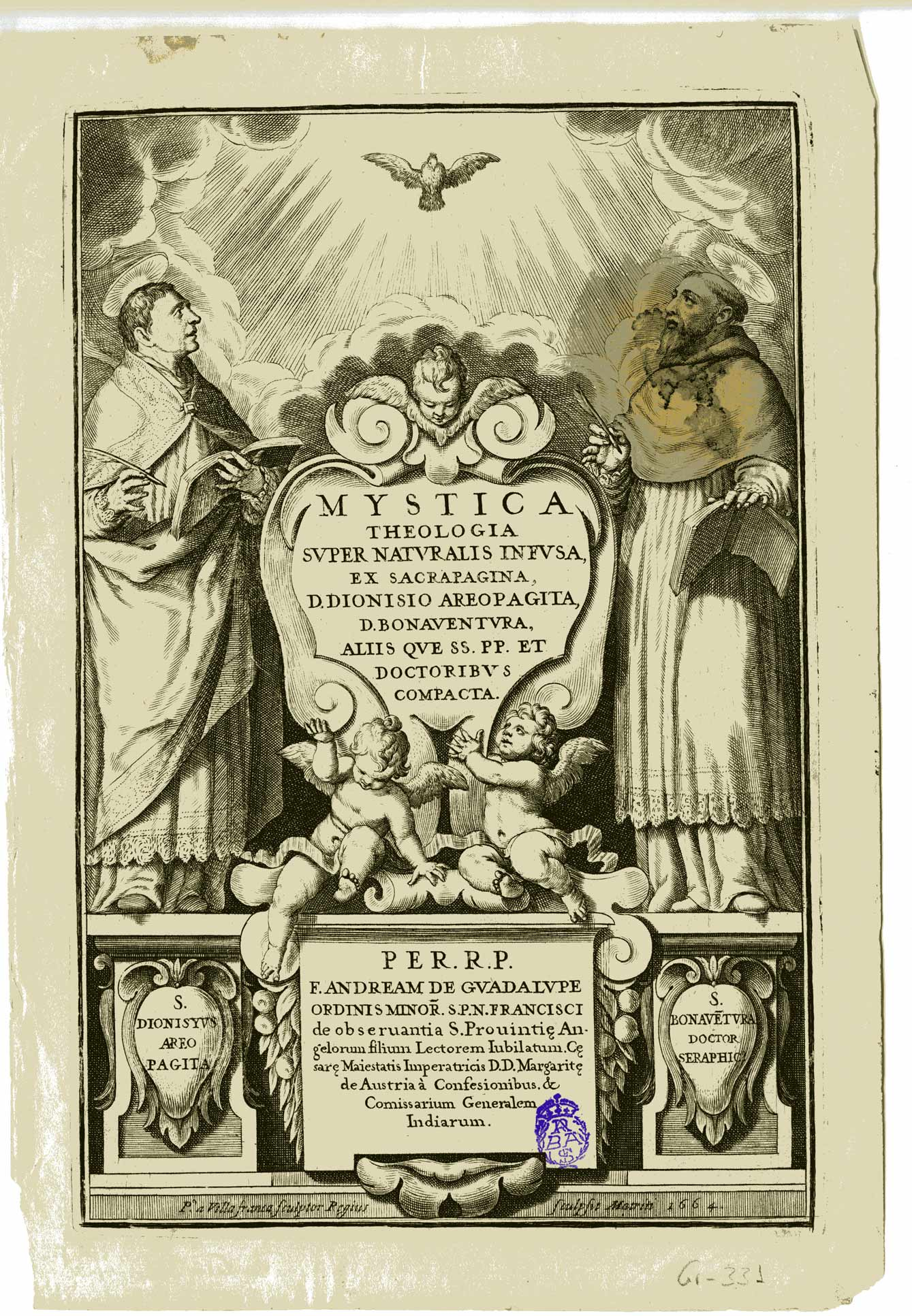 Portada de Andrés de Guadalupe, Mystica Theologia super naturlis infusa...1665 San Dionisio Areopagita y san Buenaventura. Real Academia de Bellas Artes de San Fernando.